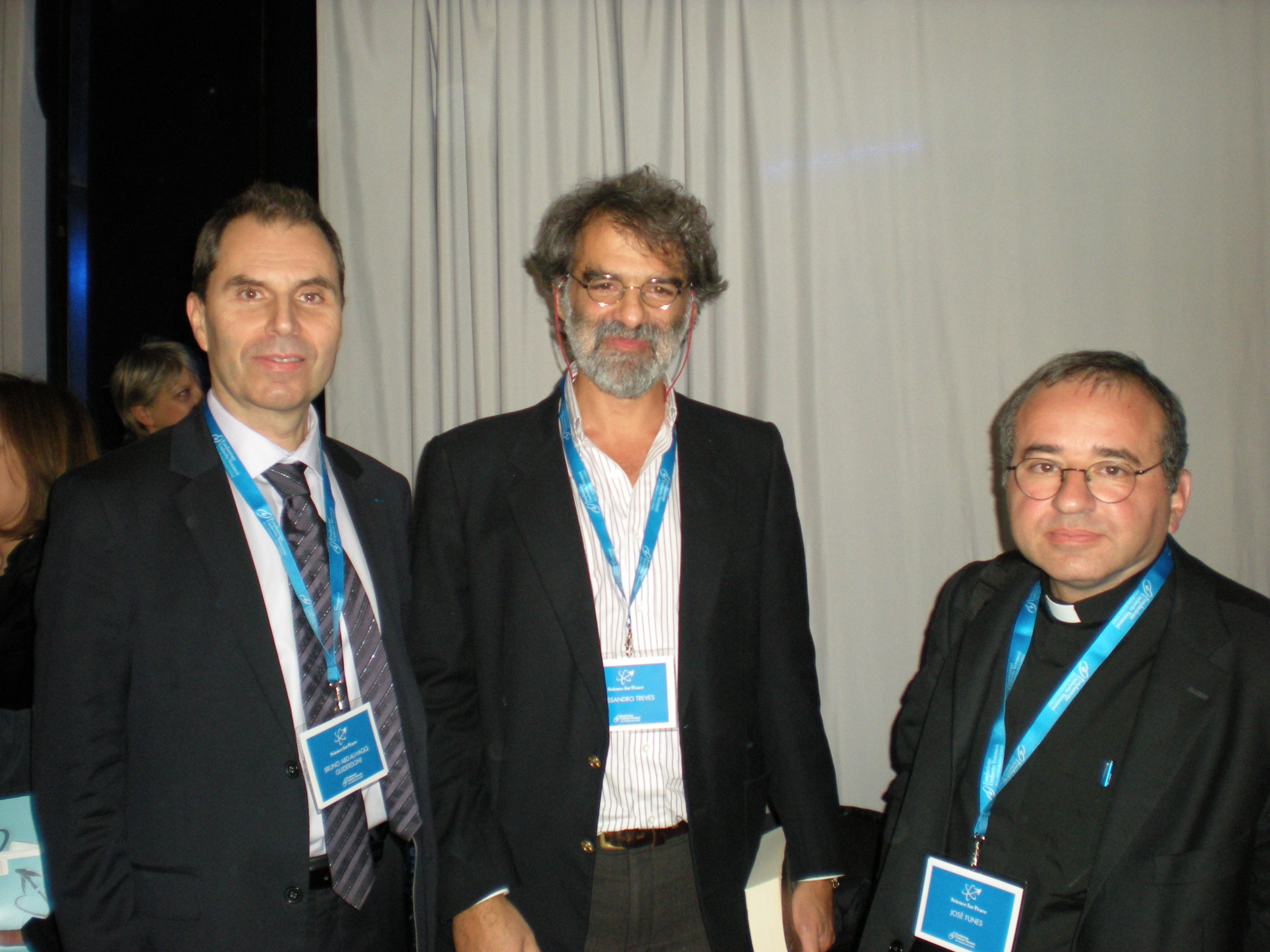 José Gabriel Funes, il primo a destra, alla conferenza mondiale Science for Peace, Università Bocconi di Milano 16 novembre 2013